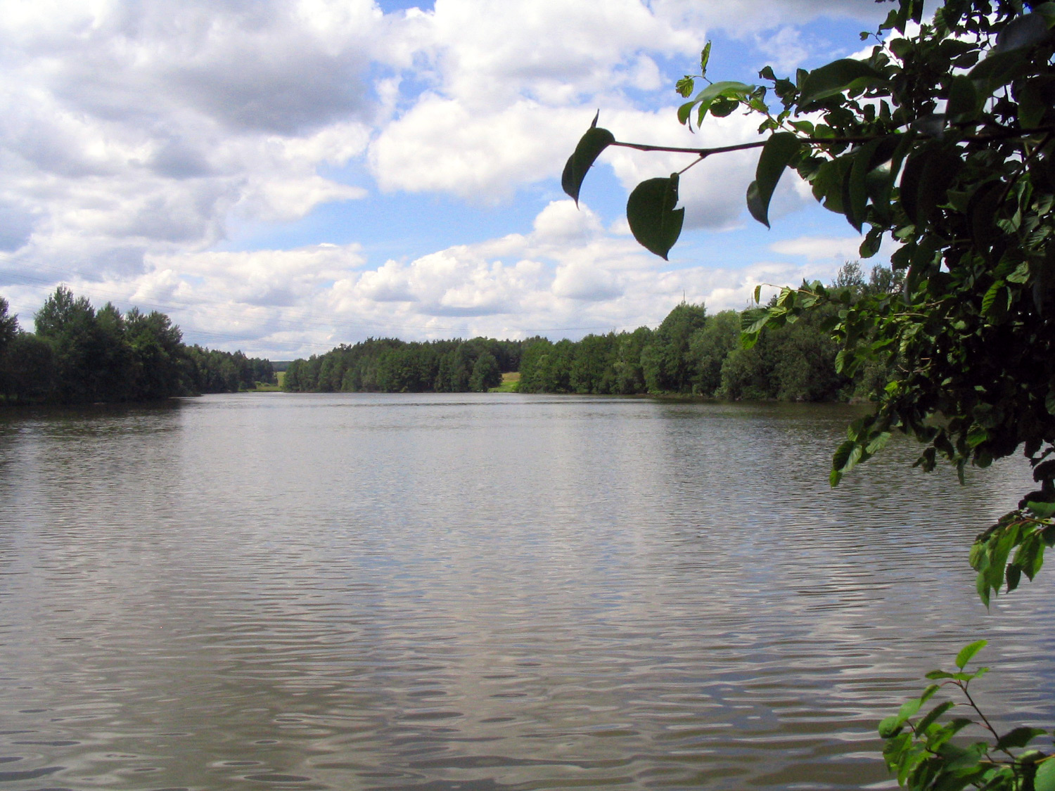 Starý rybník u Lochousic, v okrese Plzeň-sever, pohled od hráze.